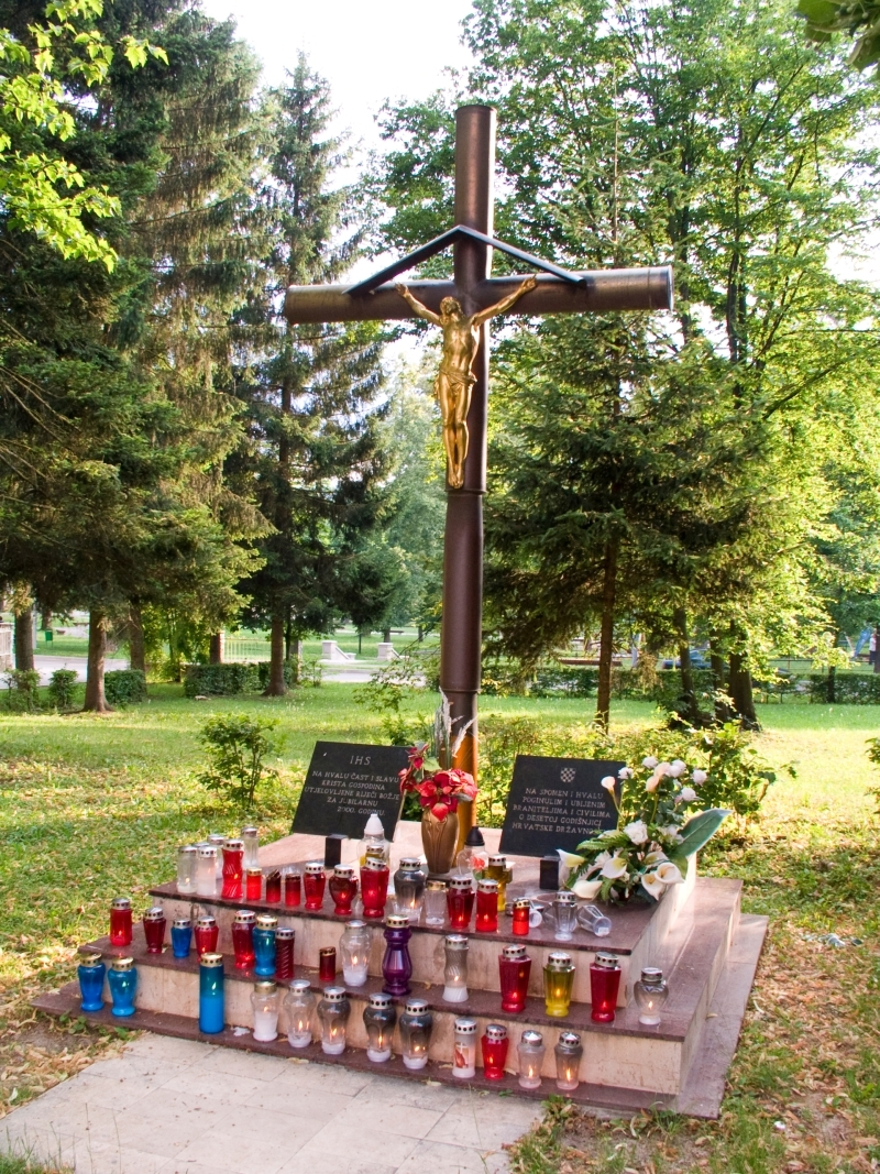 Spomenik braniteljima i civilima poginulim u Domovinskom ratu u Otočcu pokraj crkve Svetog Trojstva